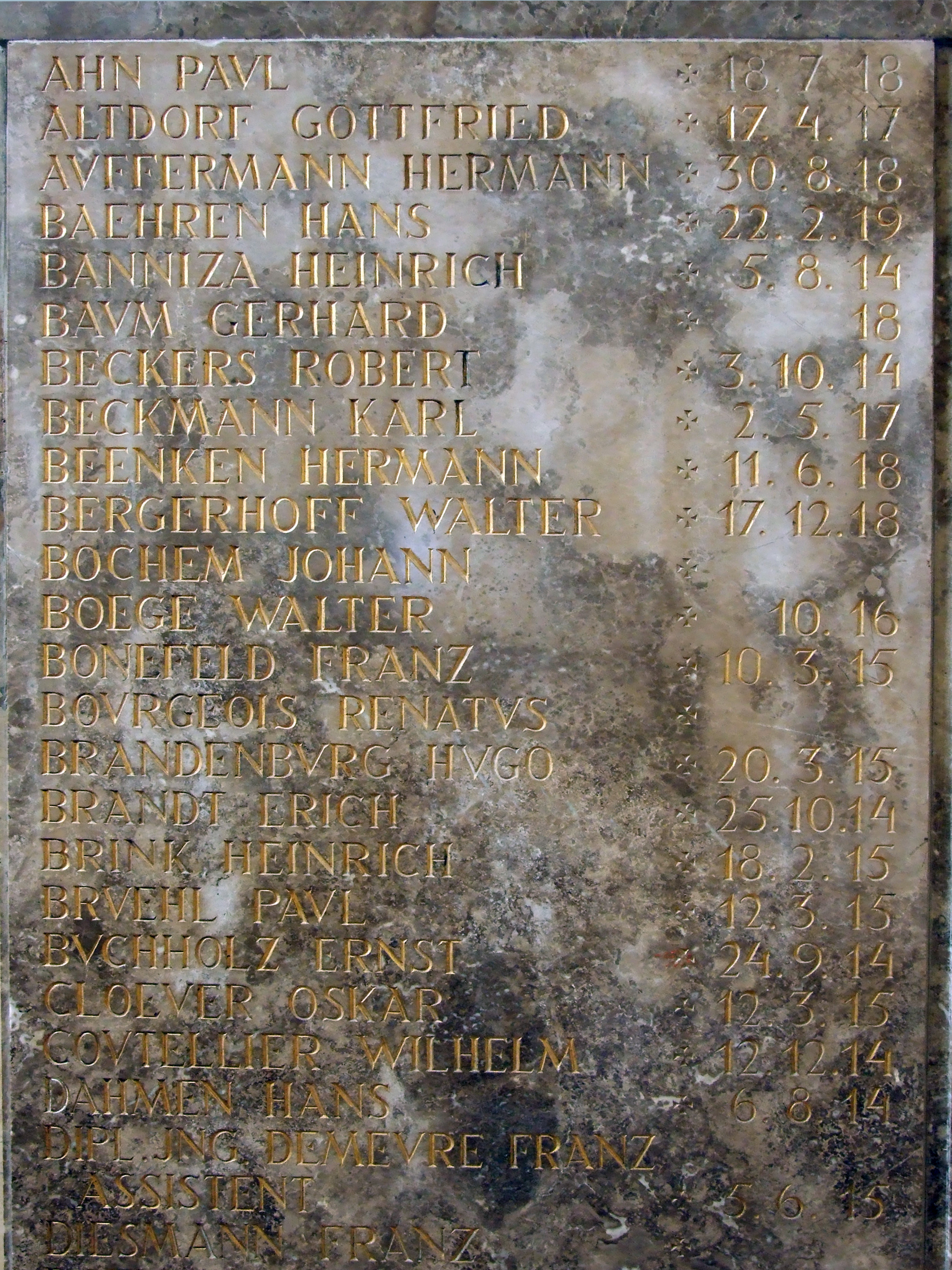 Ein Ausschnitt der Gedenktafel im Hauptgebäude der RWTH Aachen